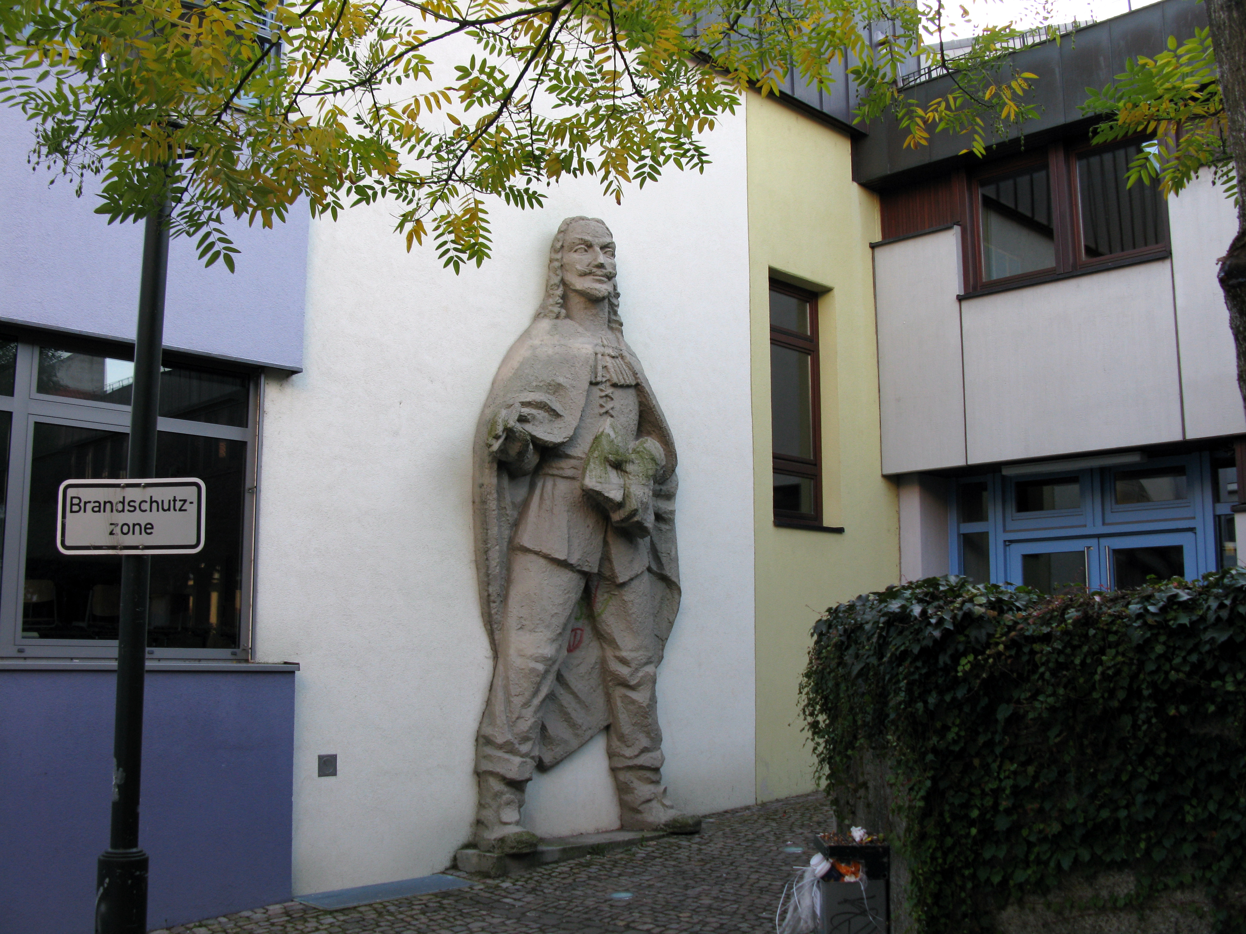 Grimmelshausengymnasium